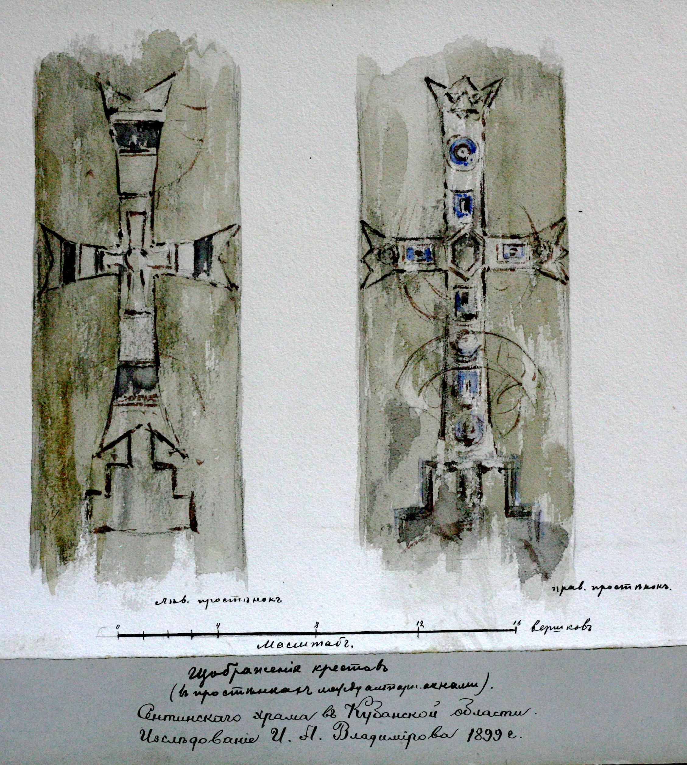 Копия фрески в простенке между окнами апсиды Сентинского храма. Акварель И.А. Владимирова. 1899 г. ИИМК РАН. Р. I. Д. 201. Л. 10.